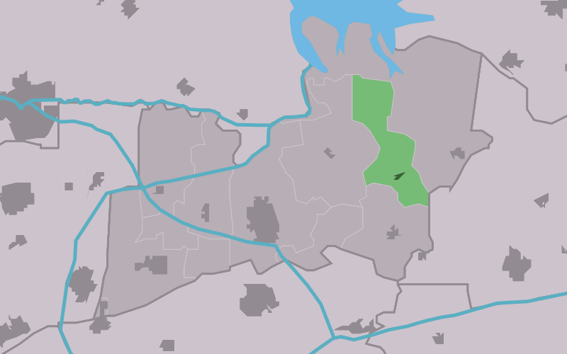 Kaartsje fan himrik fan Warfstermûne